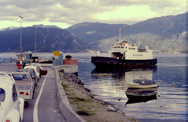 MF Rosendal i 1977 ved Tørvikbygd.